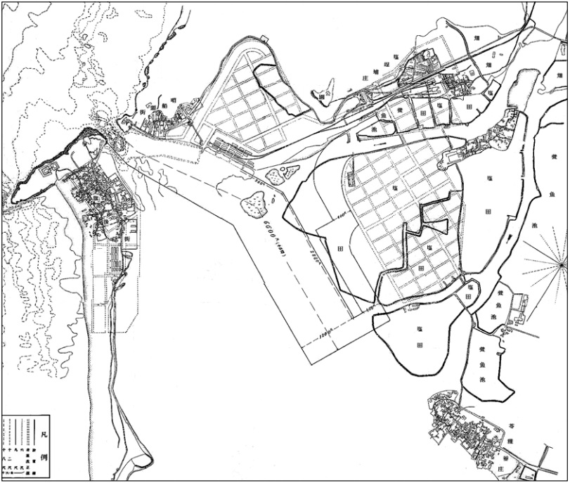 中文（台灣）: 打狗築港計畫圖（第一期築港）1908年